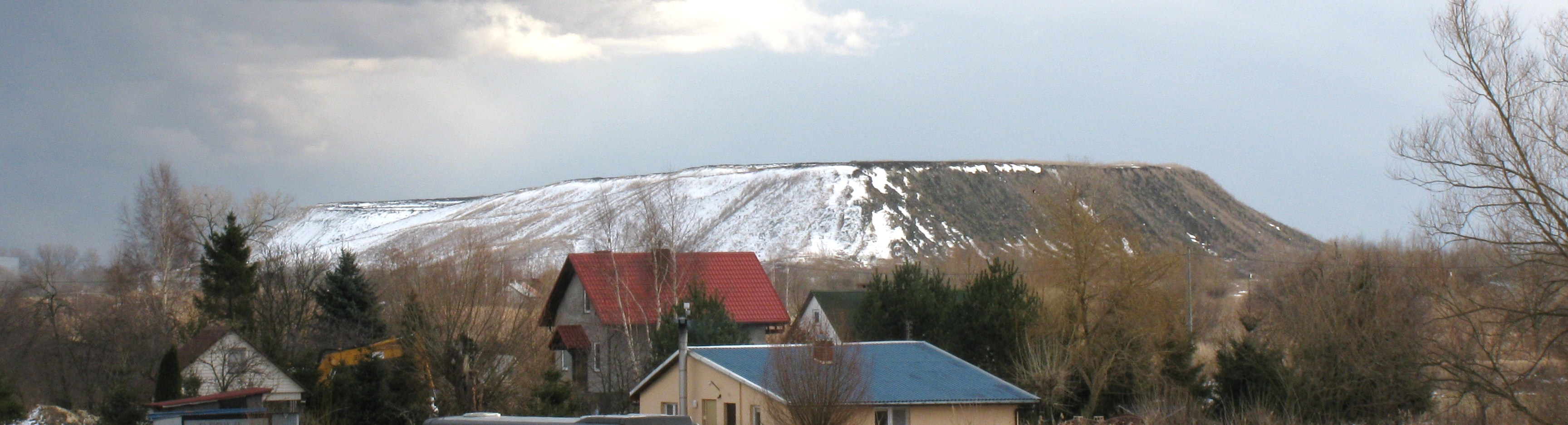 Hałda, wieś Wiślinka koło Gdańska.